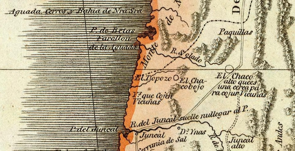 Detalle Bahia de Nuestra Señora del Mapa geografico de America Meridional de Juan de la Cruz Cano y Olmedilla